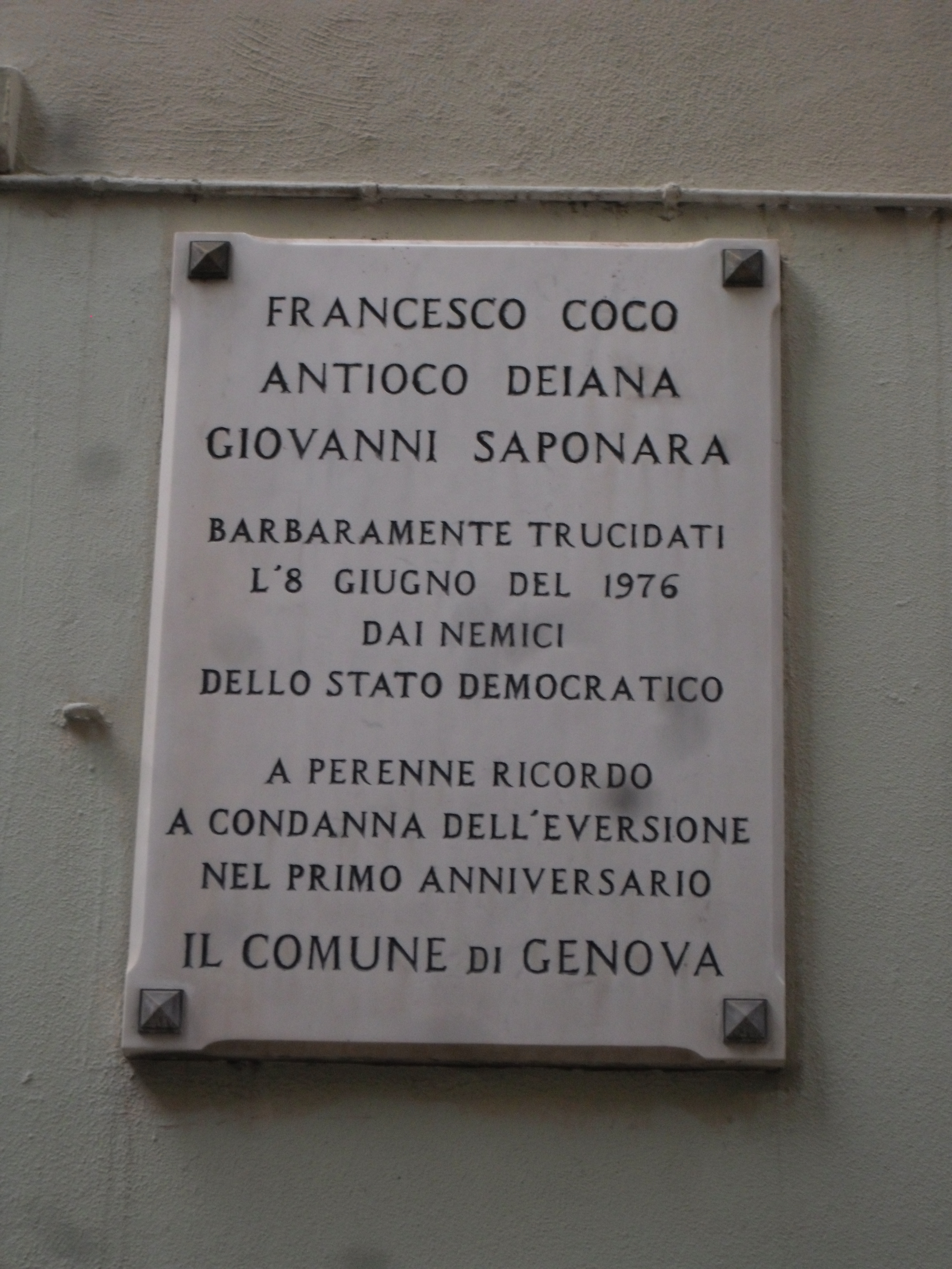 Targa commemorativa del giudice Francesco Coco e della scorta